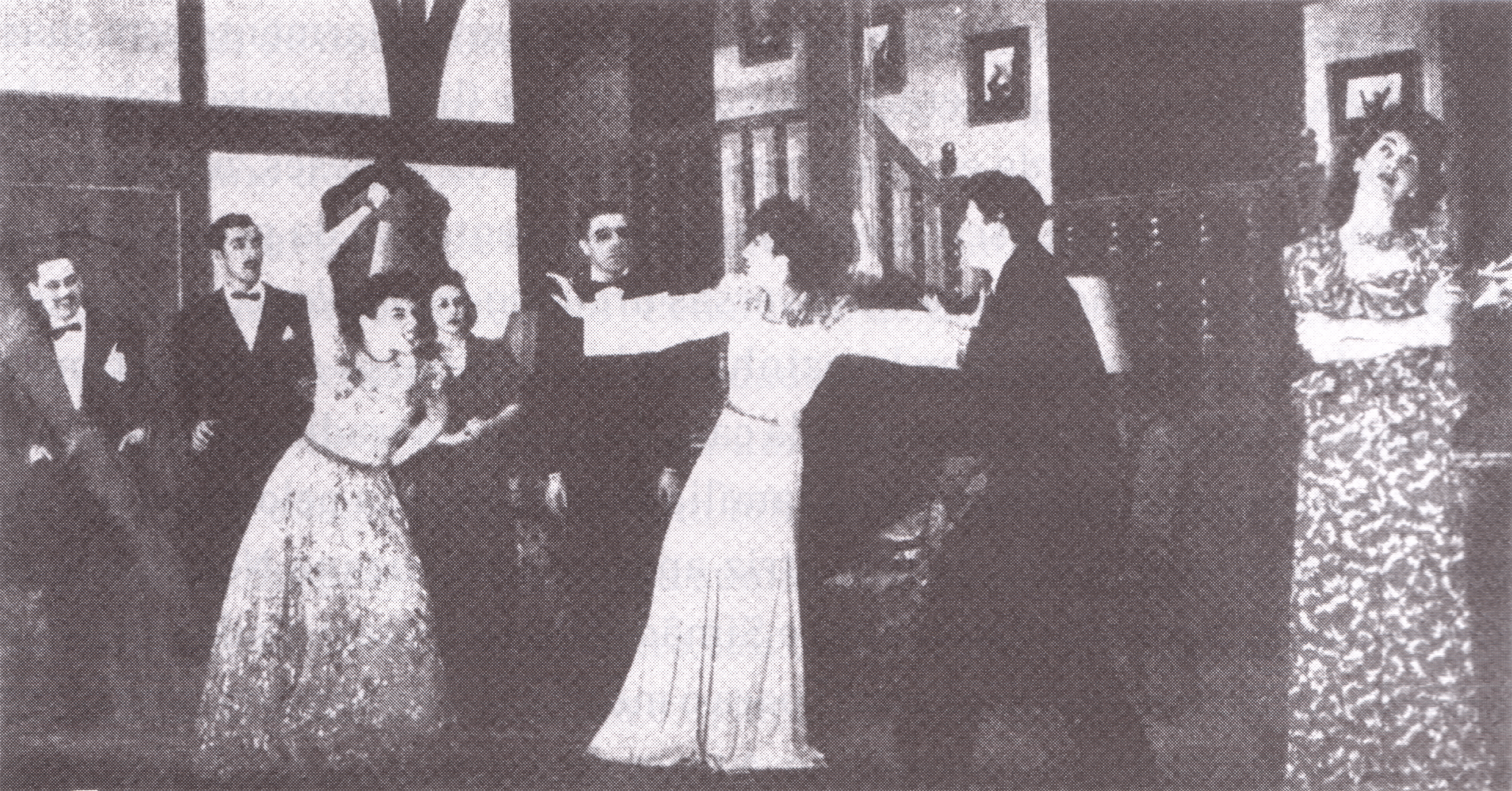 Da esq. para a dir.: Ferreira Leite, Tito Lívio Fleury Martins, Bibi Ferreira, Maria Izabel, Ribeiro Martins, Suzana Negri, Alberto Perez e Cacilda Becker. Cena de "Que Fim de Semana!", produzido pela Companhia de Comédias Bibi Ferreira; Rio de Janeiro, RJ, 25 de novembro de 1944 (data da publicação original em revista).